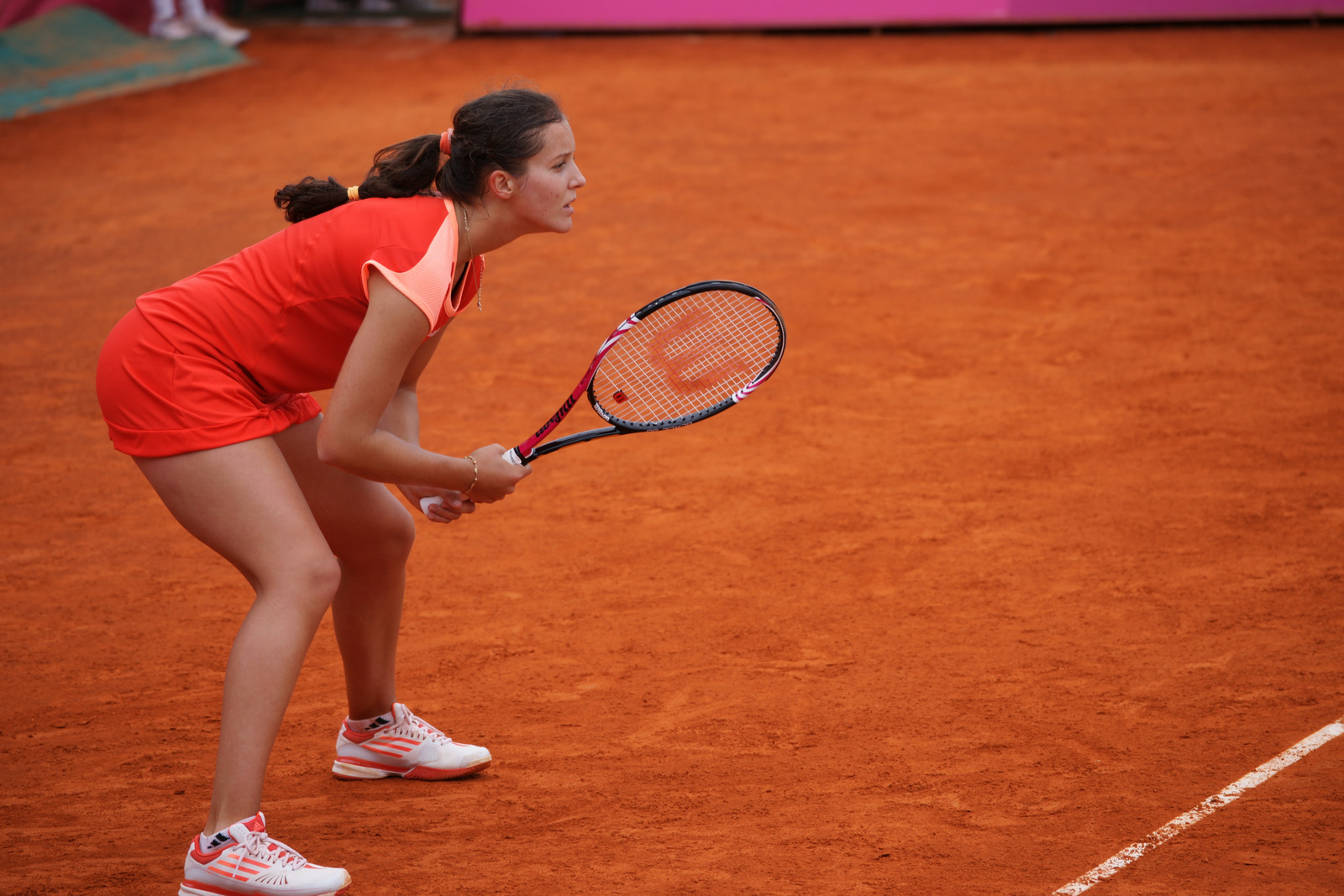 Laura Robson, Open tennis Cagnes-sur-Mer 2012